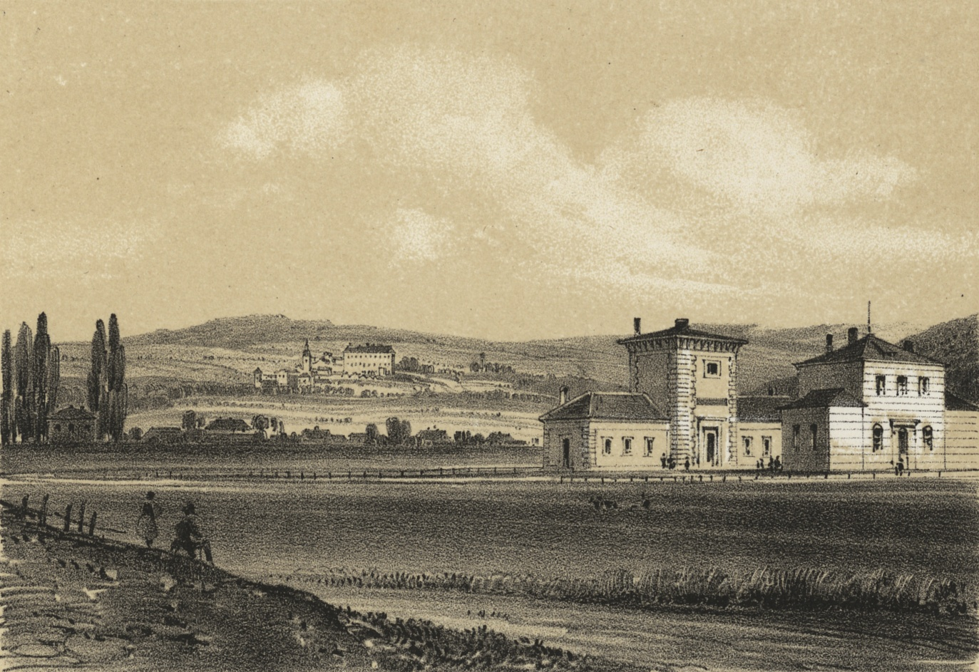 Nádraží Mohelnice, v pozadí Úsov